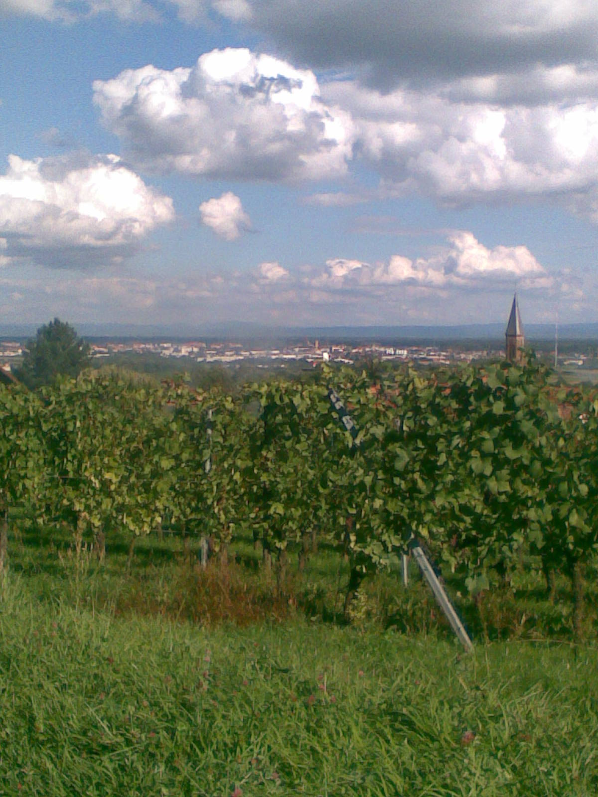 Vigne du Koenisbourg avec Selestat en fond